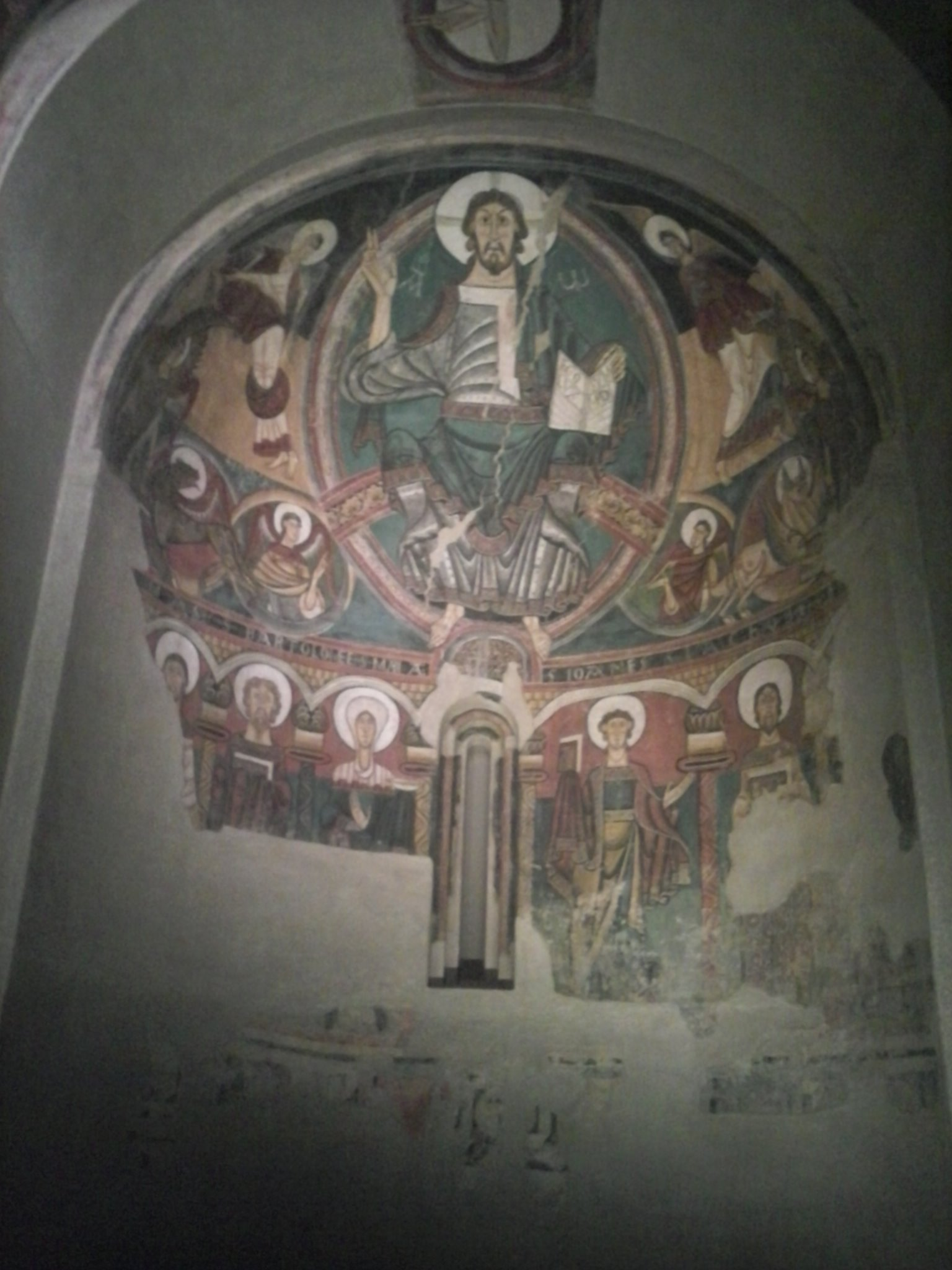 Cristo en majestad, ábside de San Clemente de Taüll. Actualmente en el MNAC